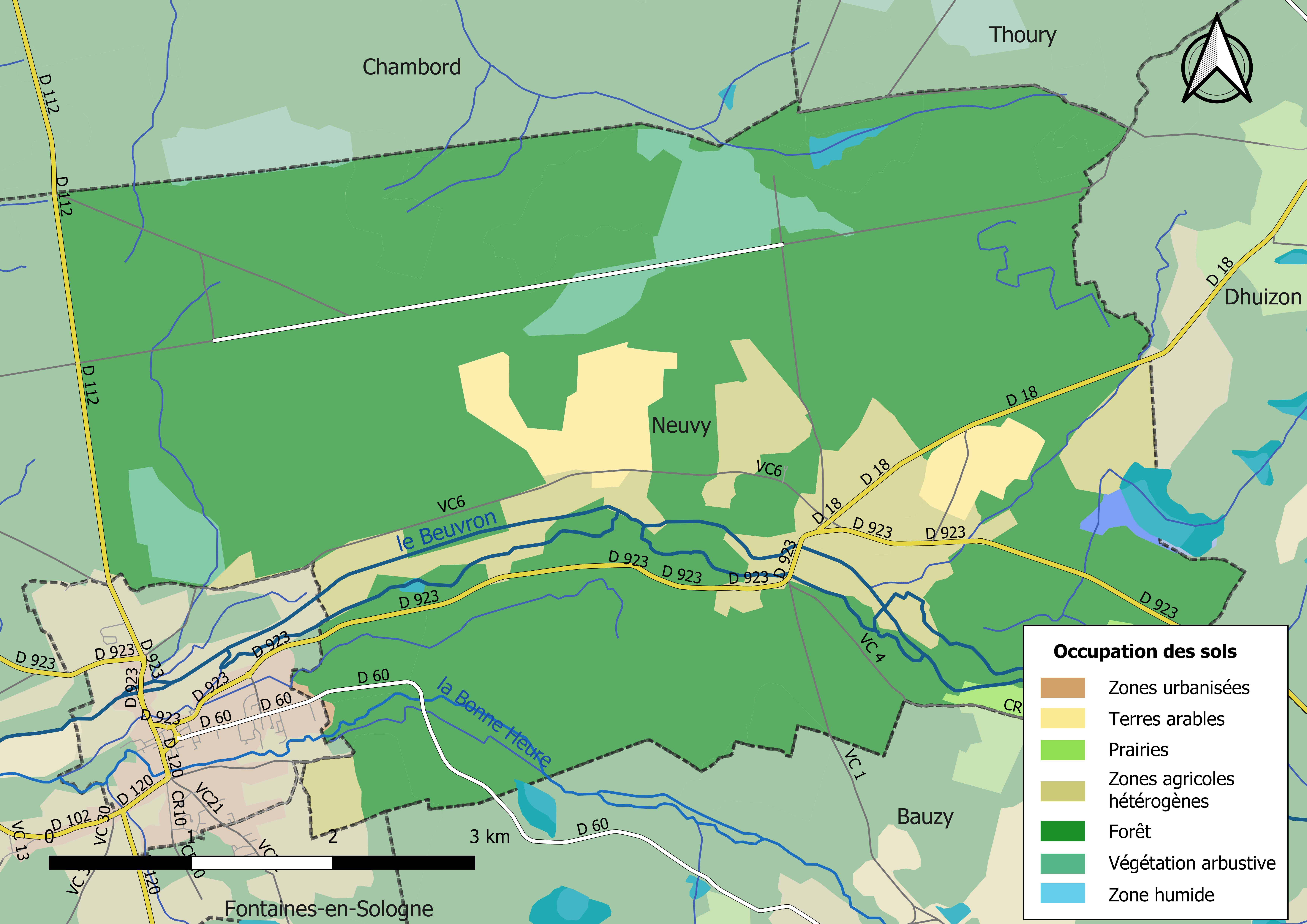 Carte des infrastructures et de l’occupation des sols en 2018 de la commune de Neuvy (Loir-et-Cher) (France).